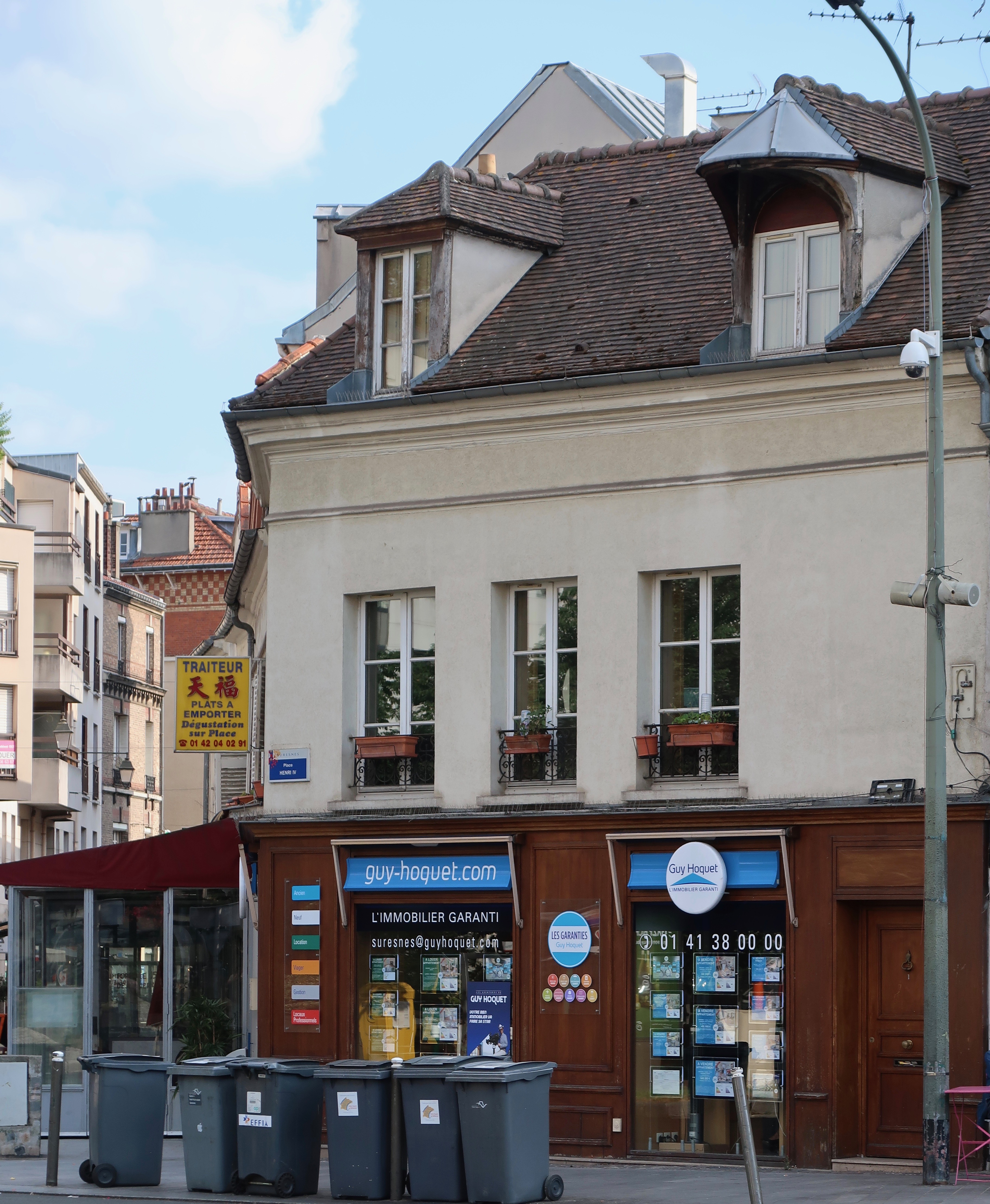 Maison du XVIIIe siècle, place Henri-IV à Suresnes (Hauts-de-Seine).